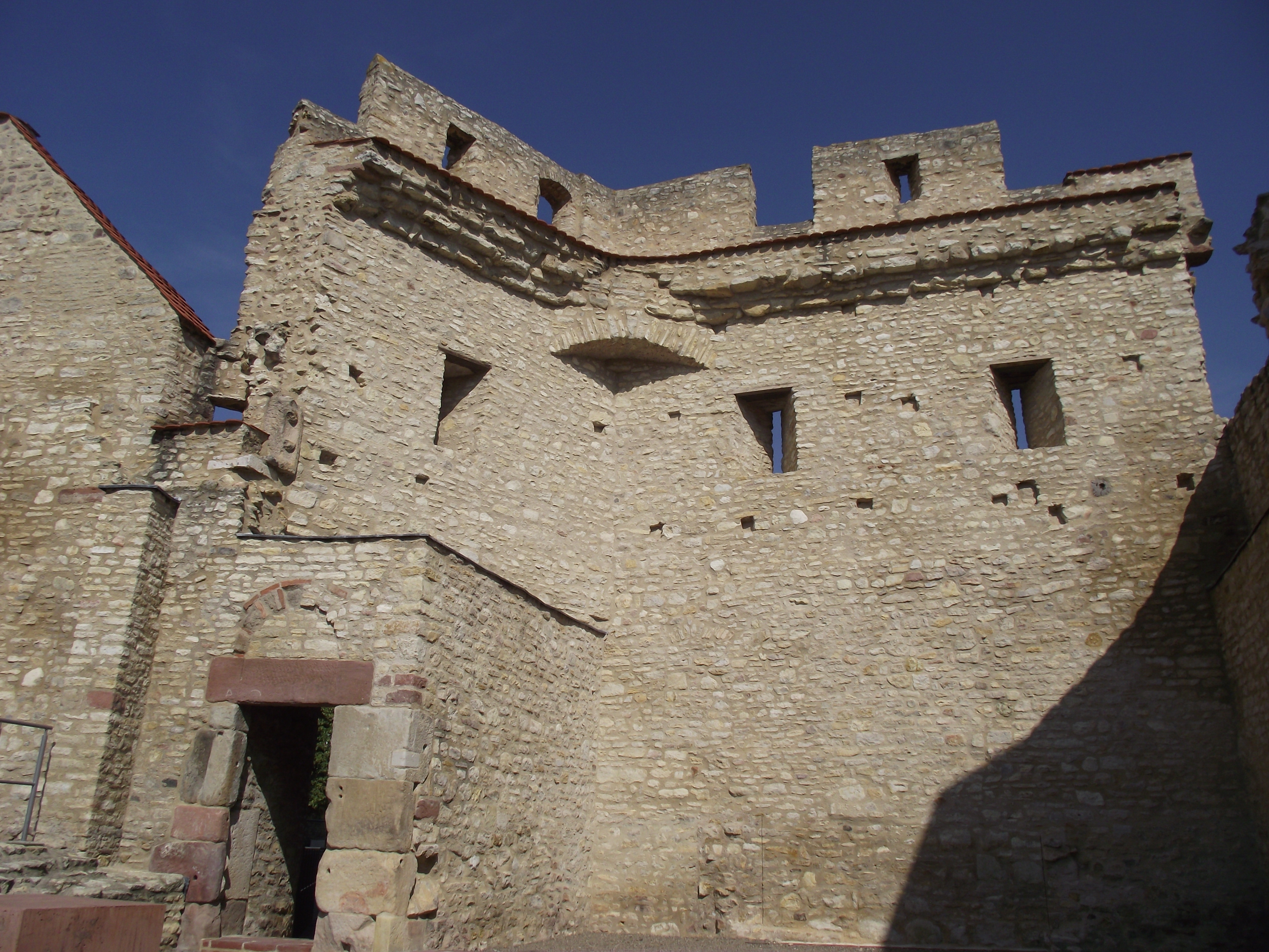 Heidesheimer Tor Westansicht